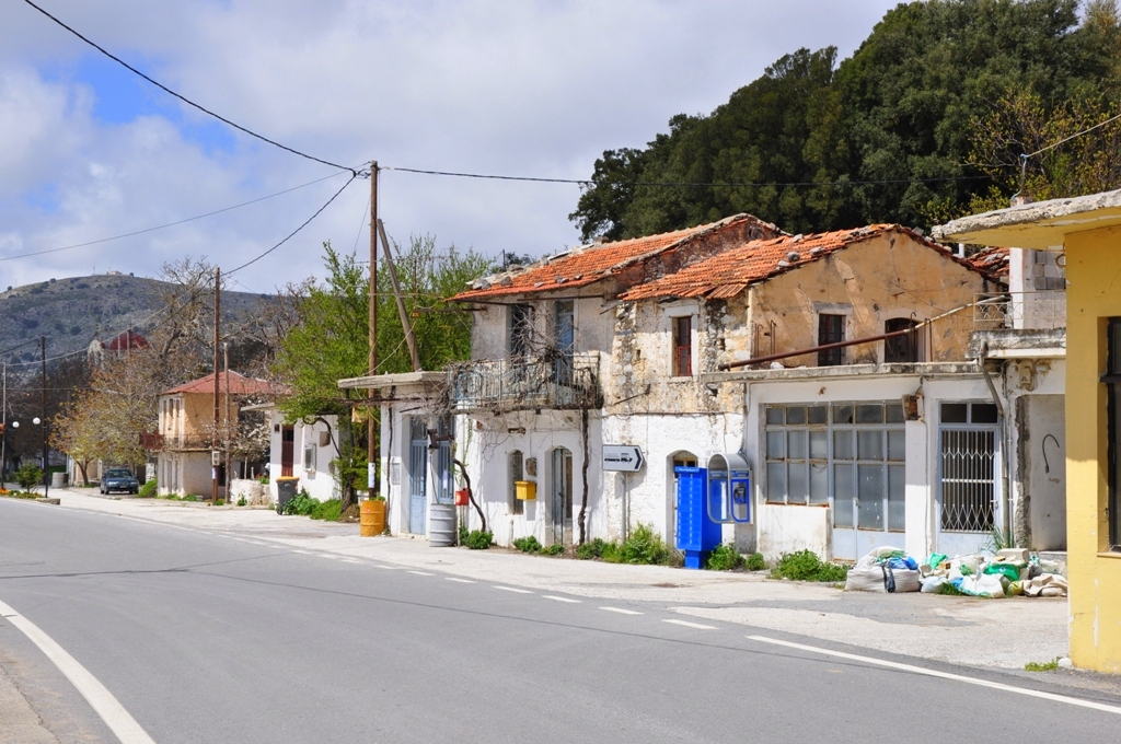 Η κεντρική πλατεία του χωριού Μαρμακέτο